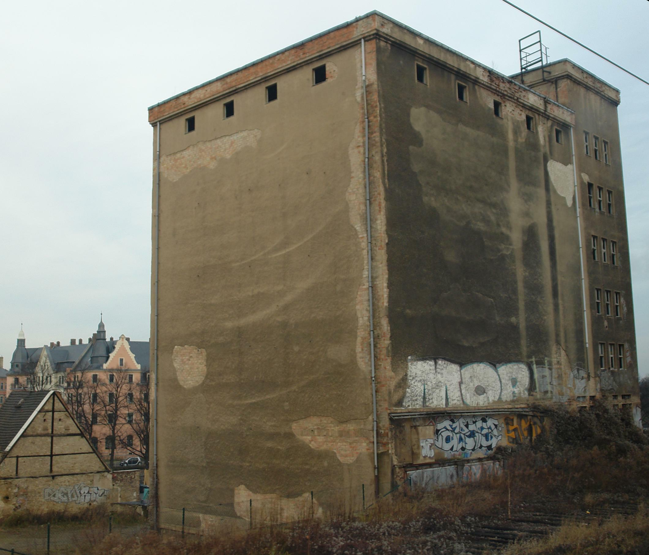 Speicher bei der Bienert-Mühle in Dresden-Plauen kurz vor dem Abriss. (Blick vom S-Bahnhof)